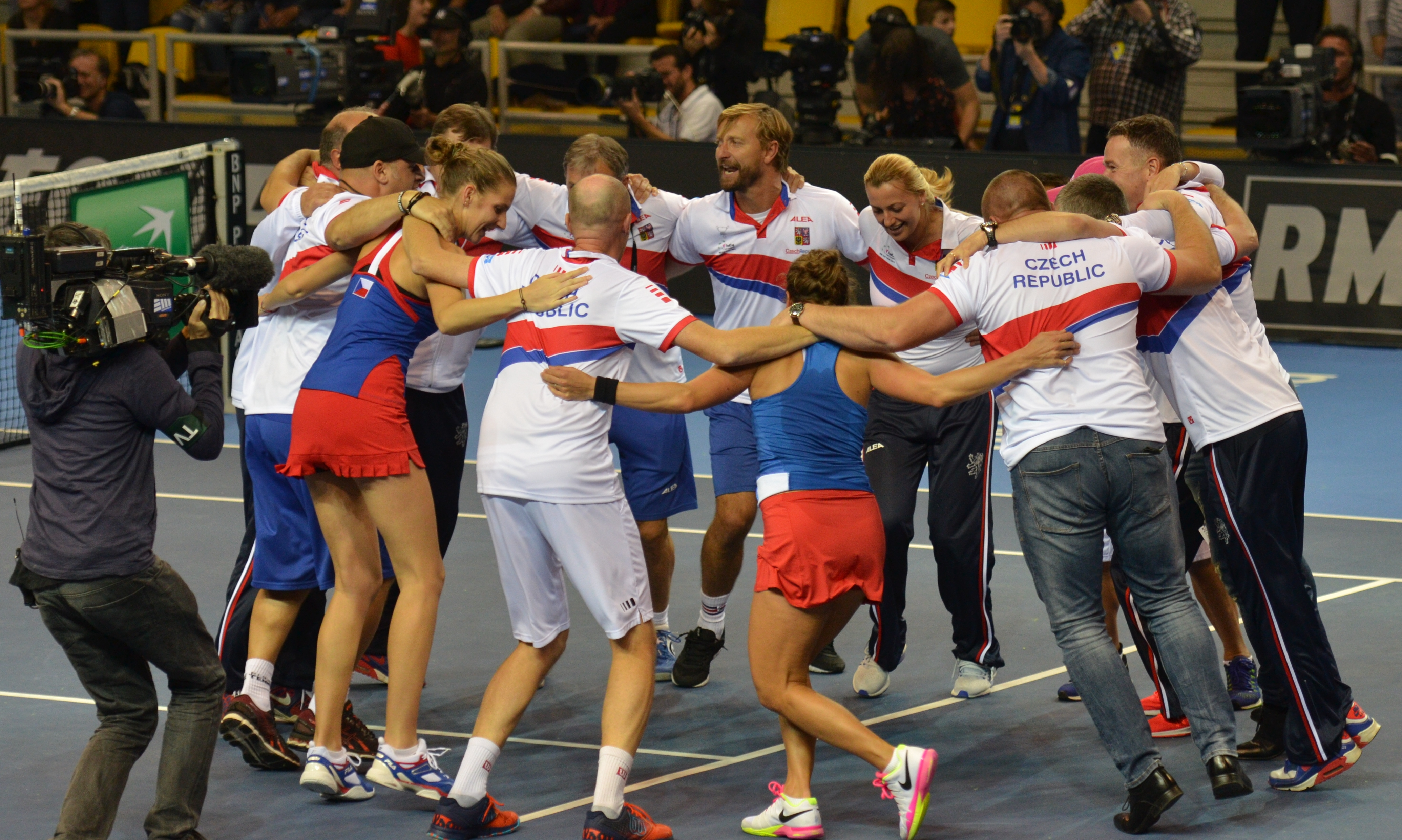 PPP_3426